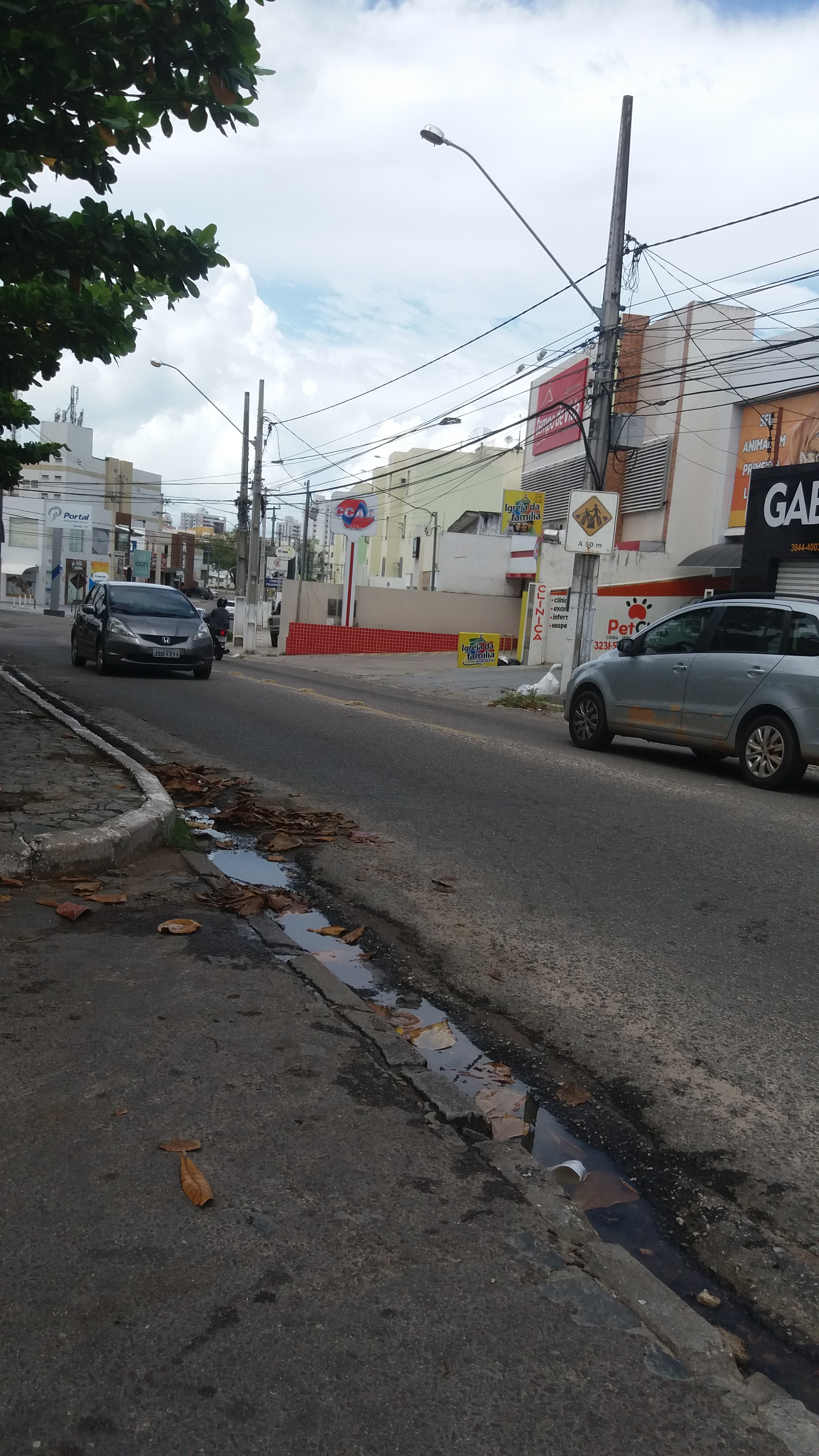 Rua Padre Nestor Sampaio, Luzia, Aracaju-SE..